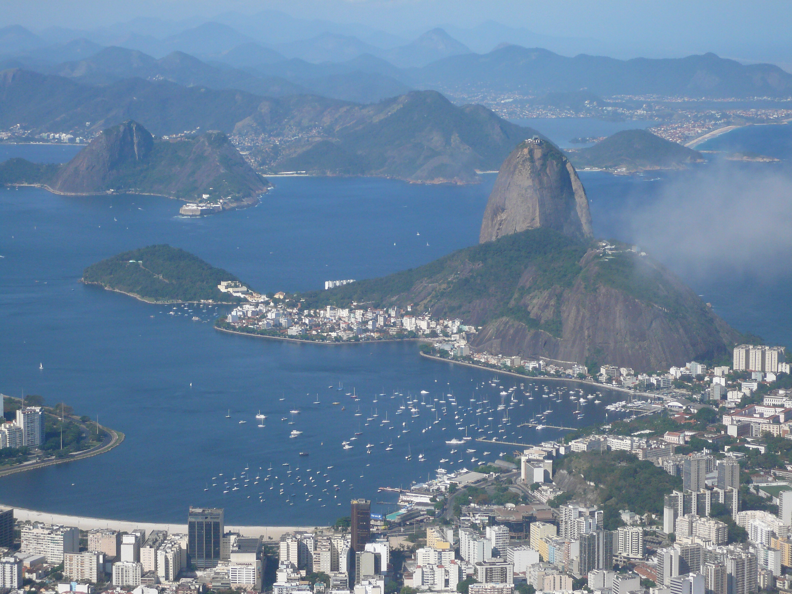 Rio de Janeiro.